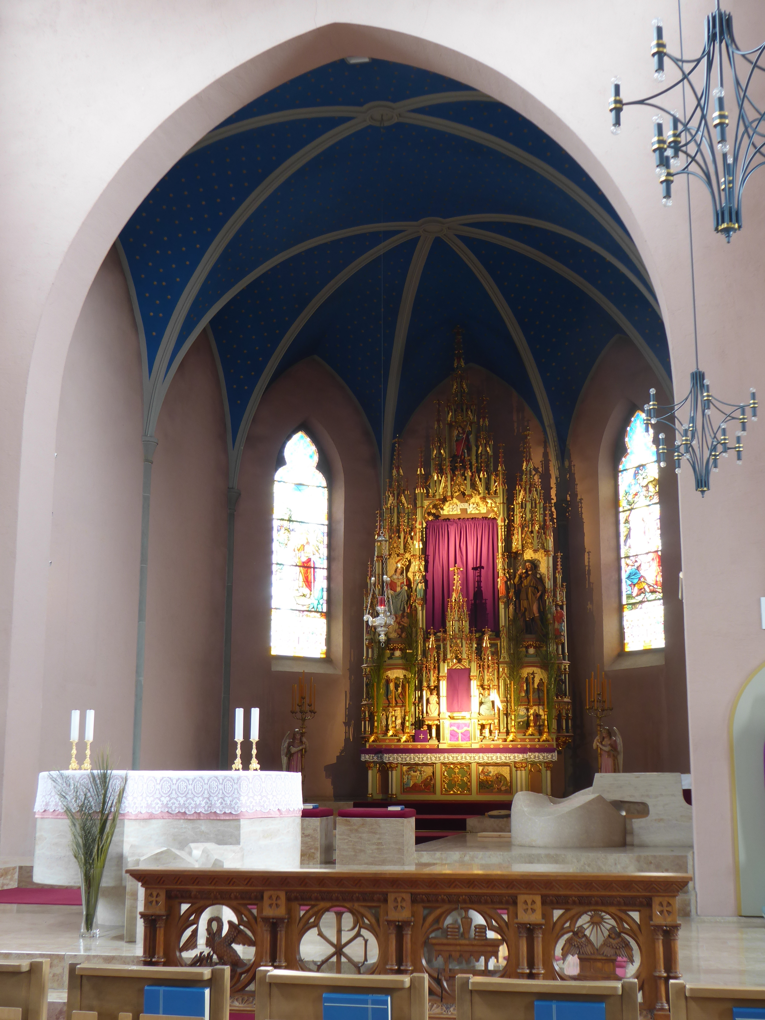 Pfarrkirche Eschen FL: Chor